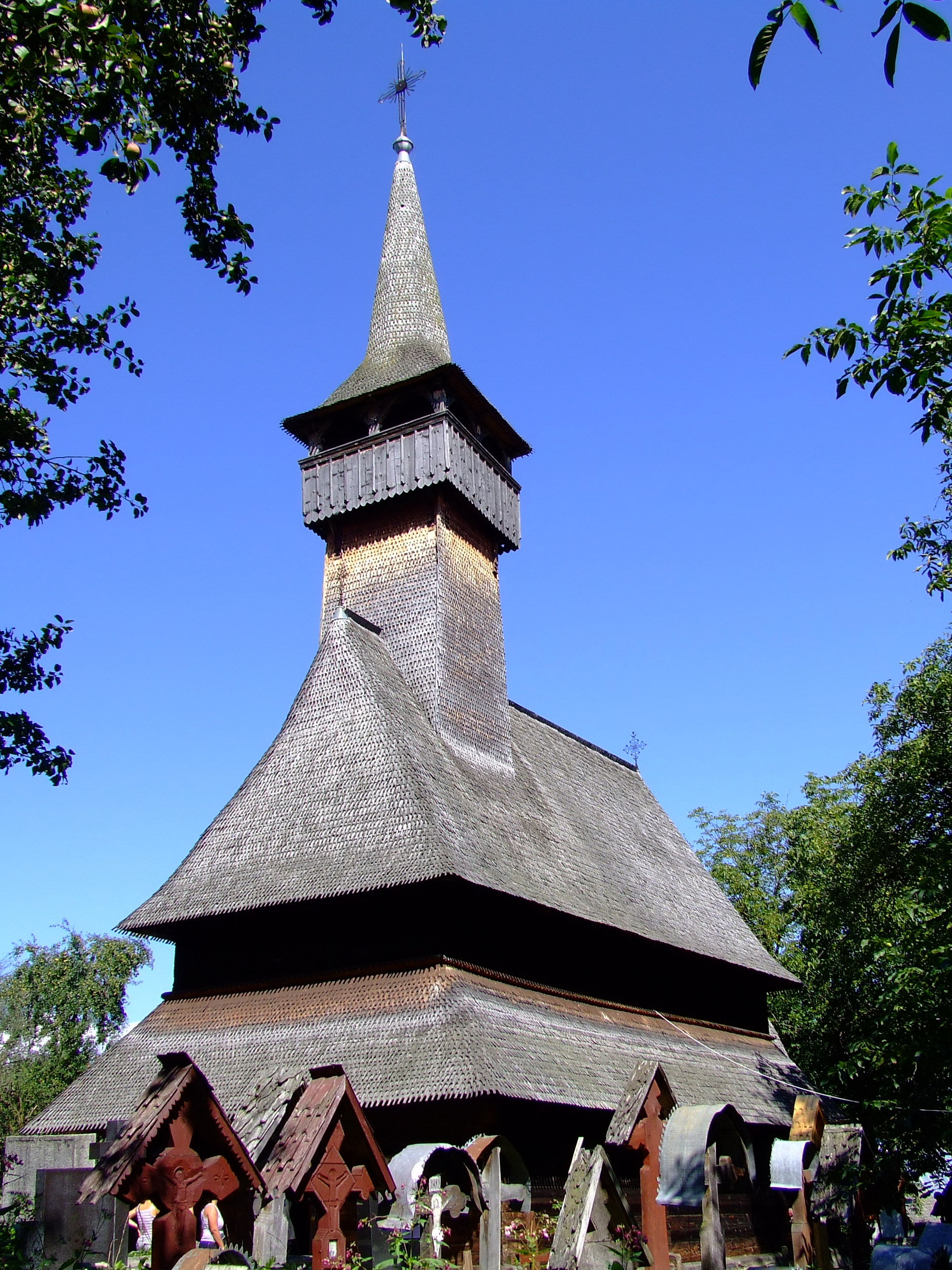 Săliştea de Sus, Ieud Deal Categorie:Biserici de lemn din Maramureş (imagini)